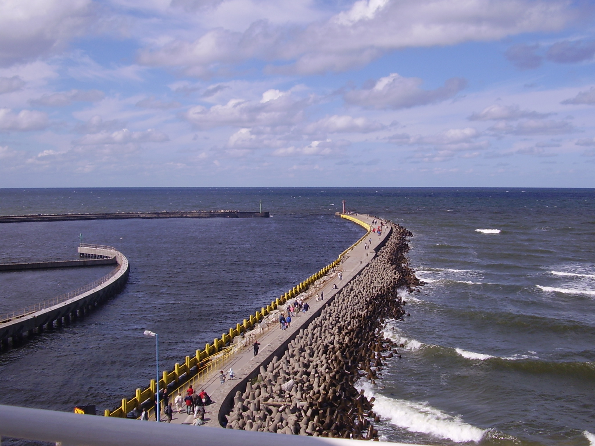 Widok z latarni morskiej w Darłowie na wschodni falochron portu